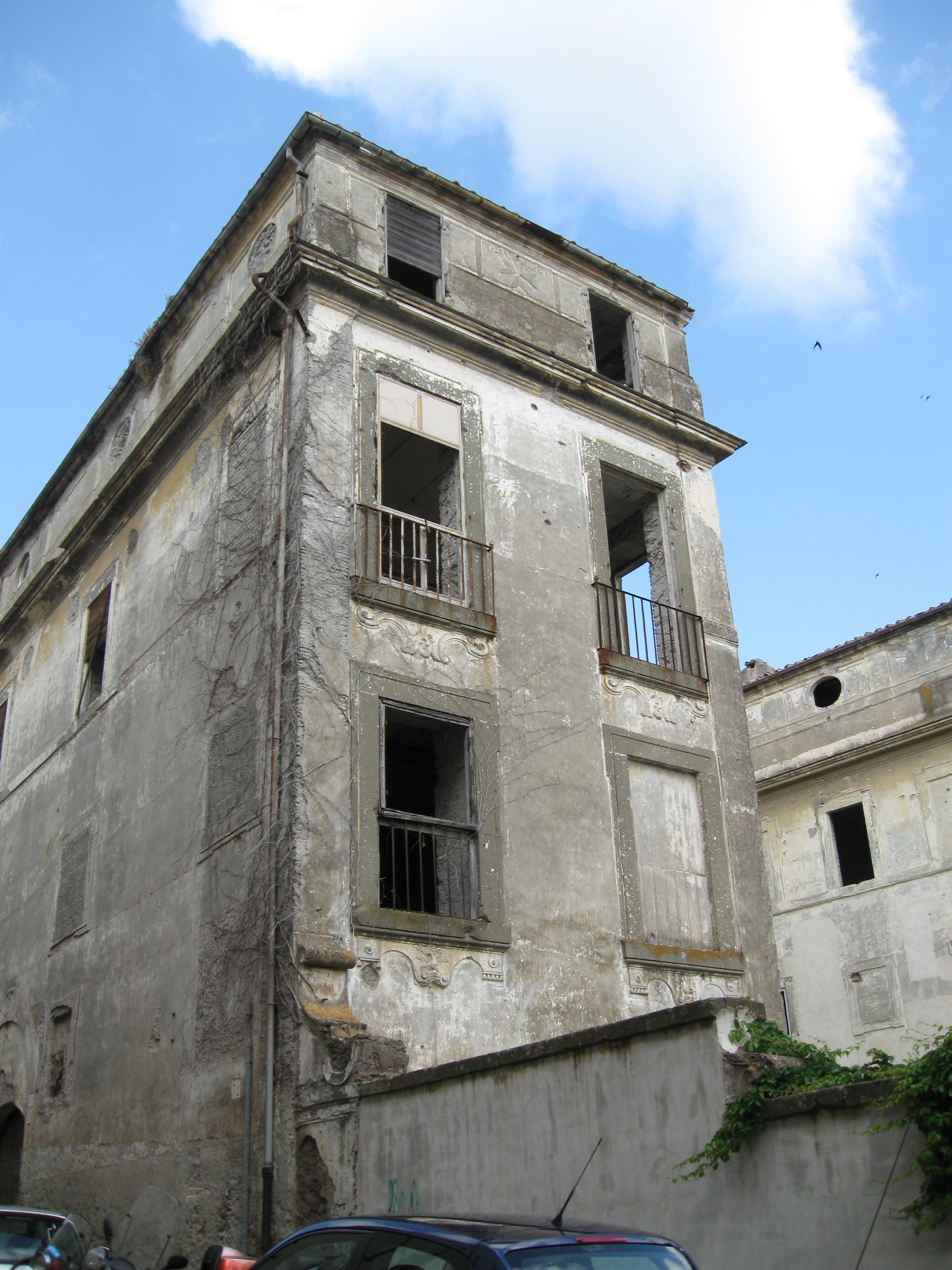 Palazzo Pamphilj ad Albano Laziale (RM): lato su via Leonardo Murialdo